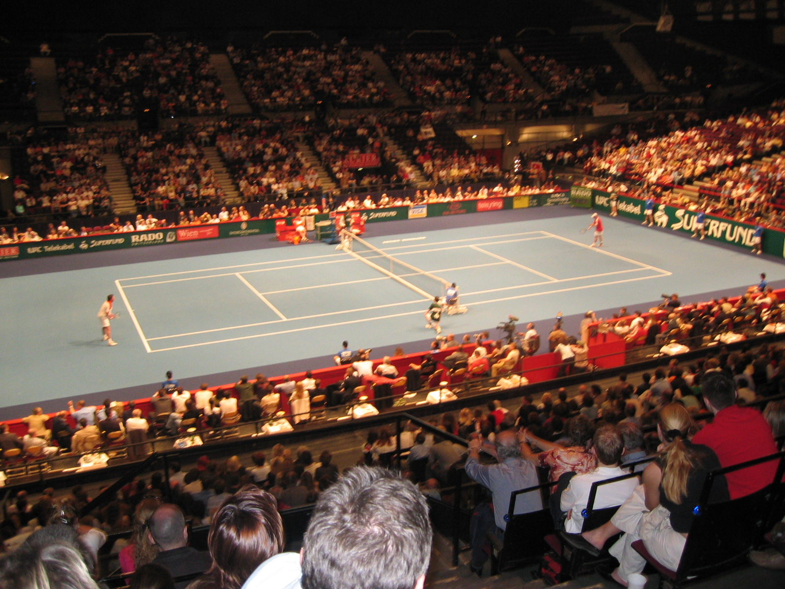 Tennis in der Stadthalle Wien